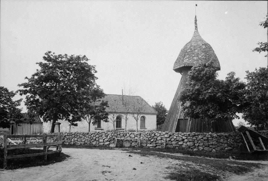 Kyrkan och klockstapeln från sydväst.